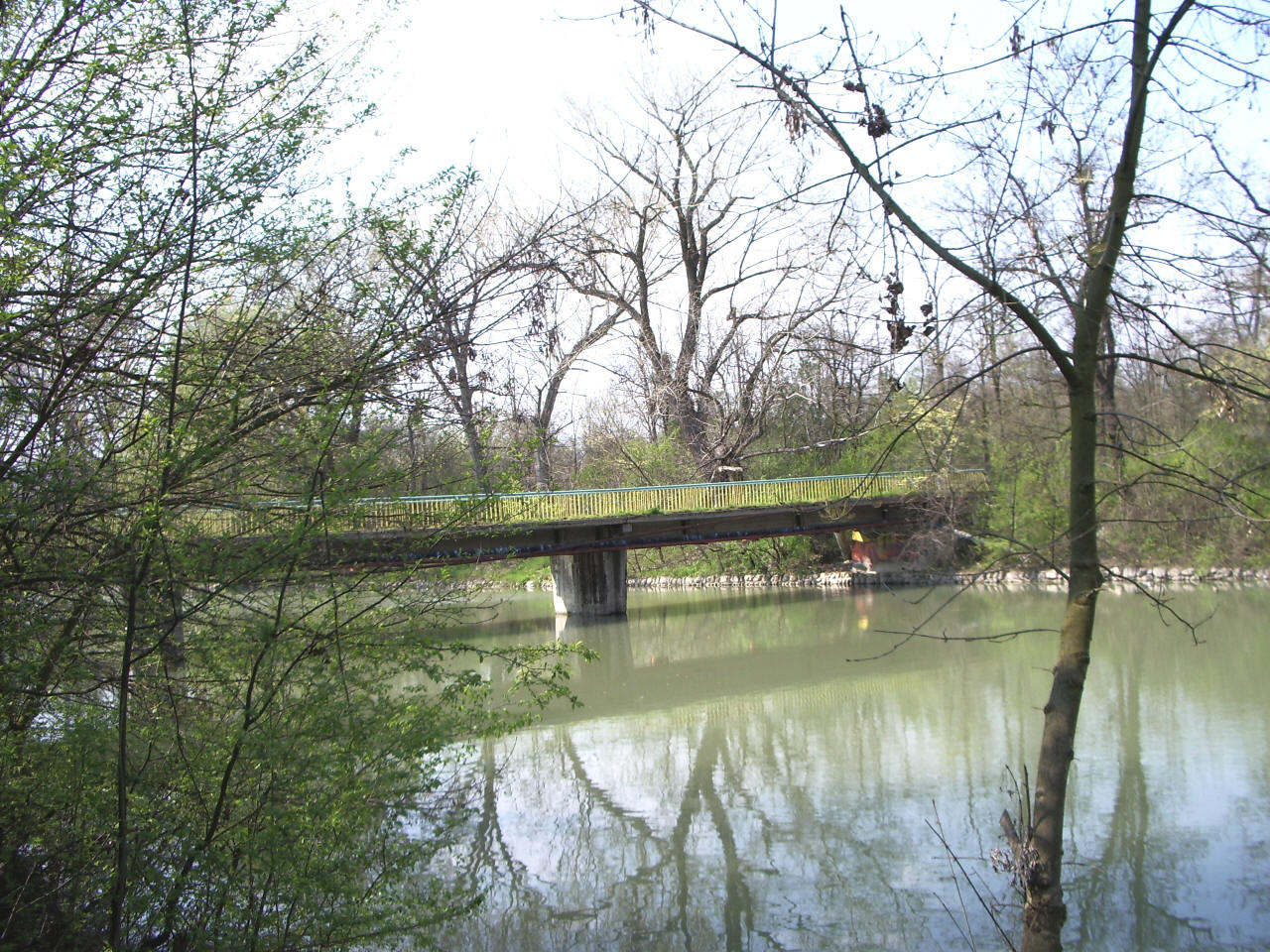 Мост над река Тунджа в Ямбол, свързващ Градският парк с квартала, където се намират професионална гимназия "Иван Райнов" (бивш механотехникум "Димитър Димов") и градския стадион